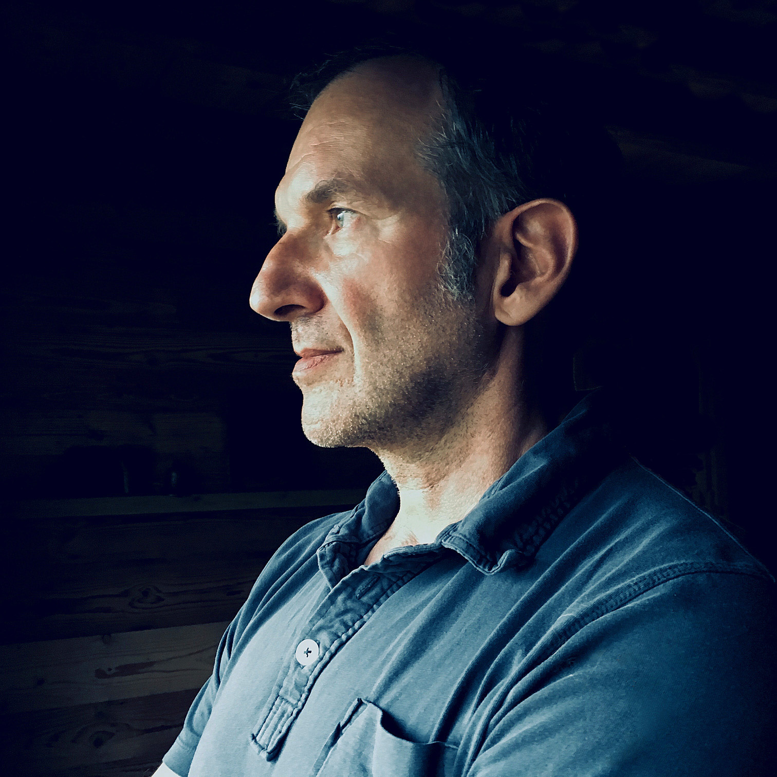 Philippe Pollet-Villard par son épouse